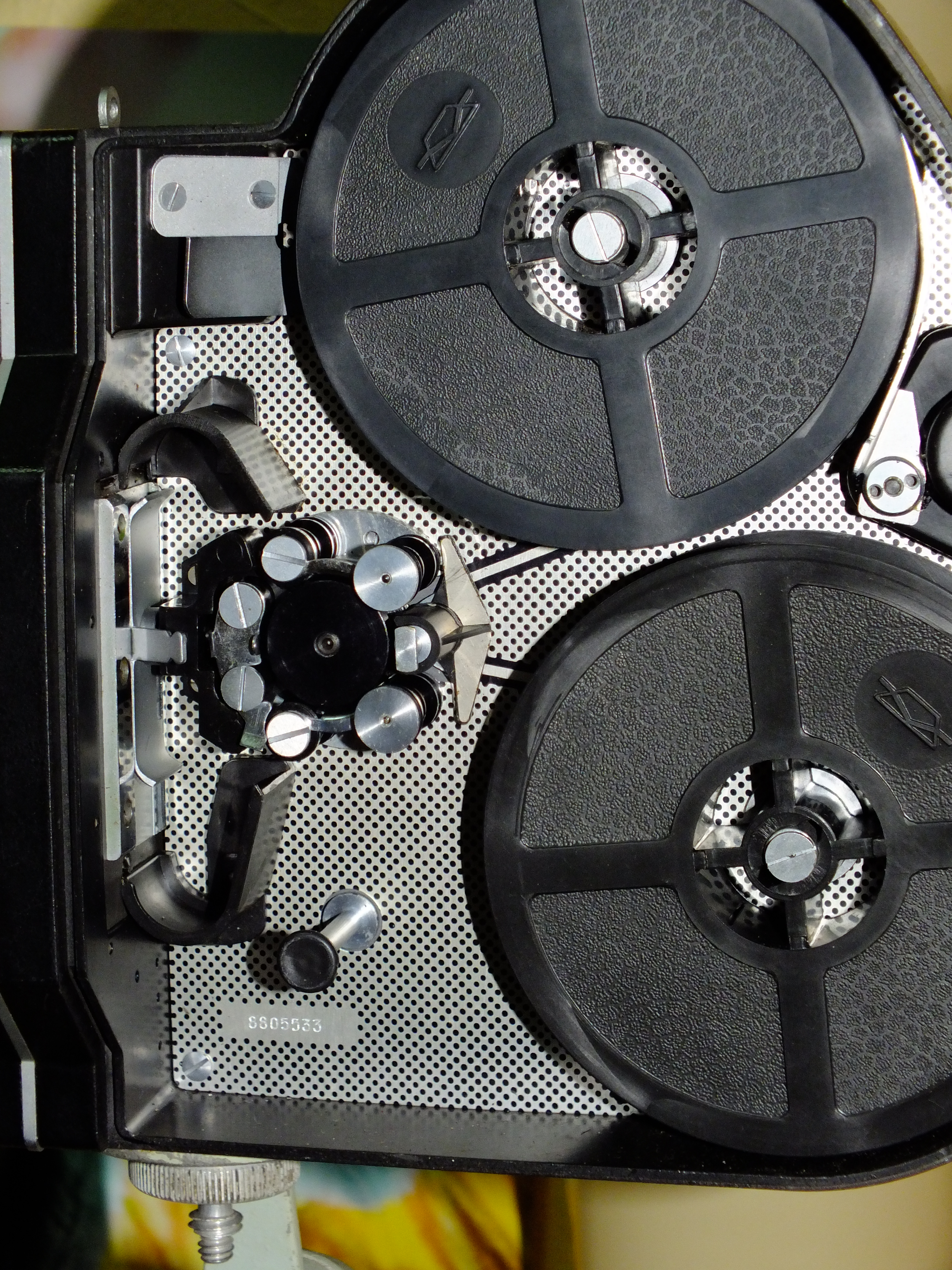 Krasnogorsk-3 camera